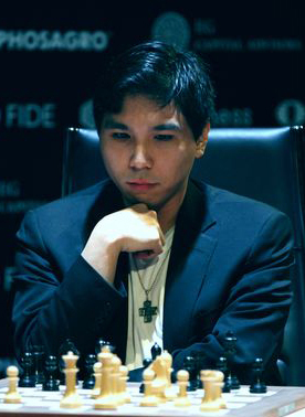 Уэсли Со, Турнир Претендентов 2018